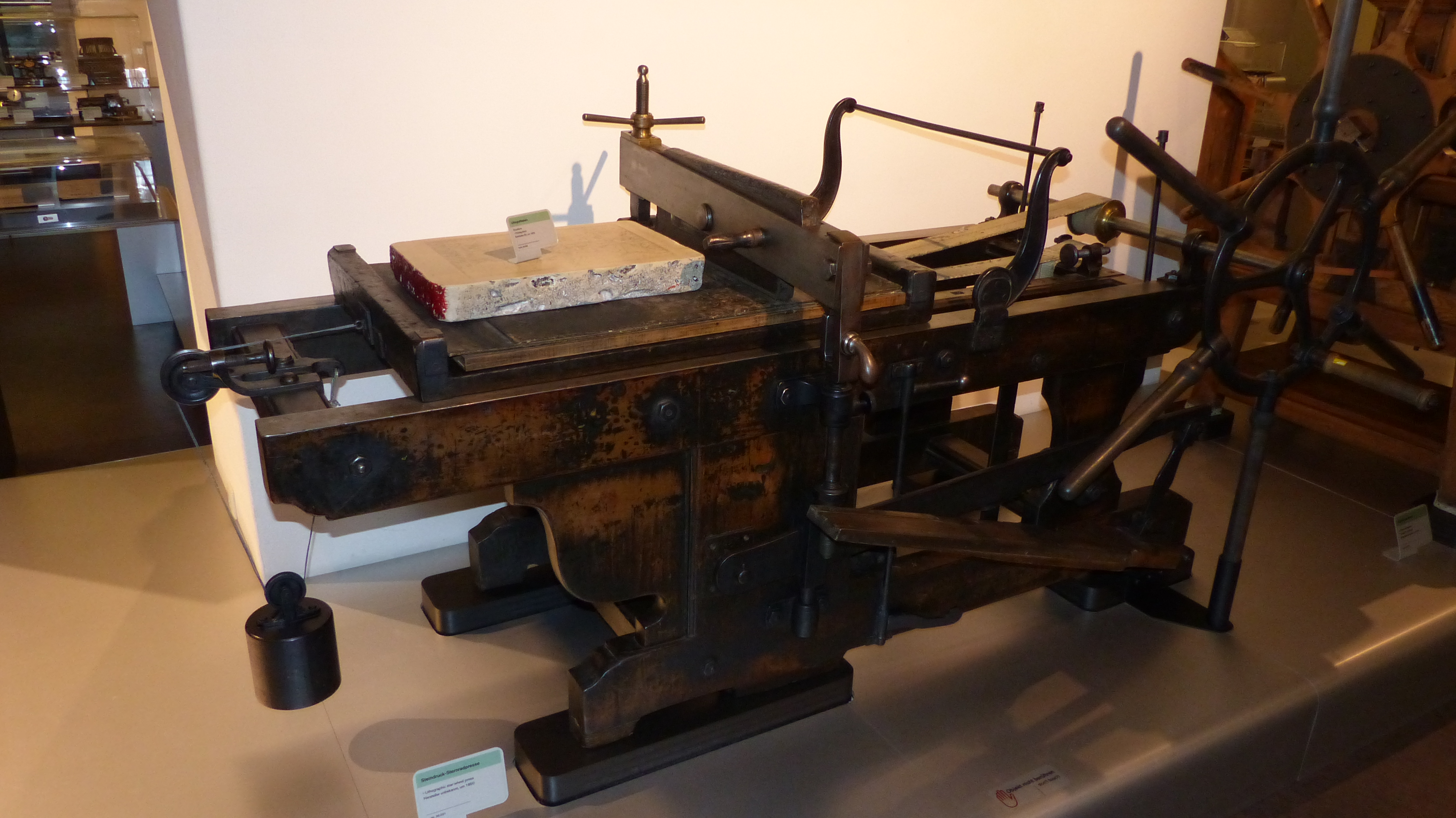 Steindruck-Sternradpresse, um 1850; Exponat im Technischen Museum Wien